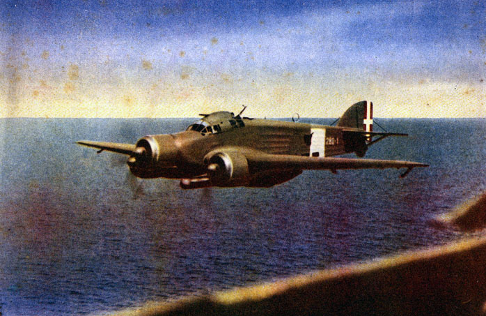 Savoia-Marchetti SM.79 a colori